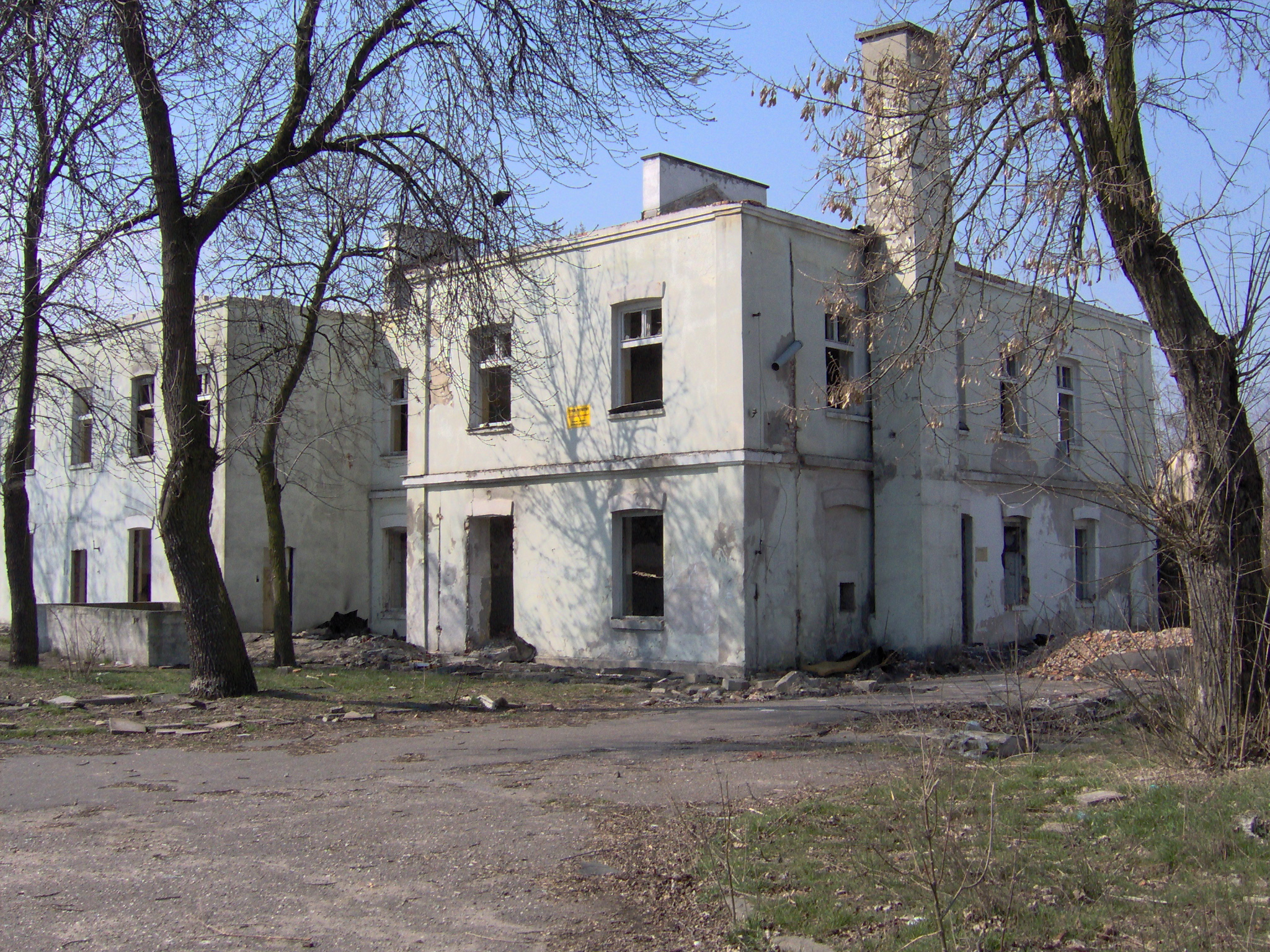 Pozostałości po byłej jednostki wojskowej przy ul. Żytniej 83 (2007 r.)